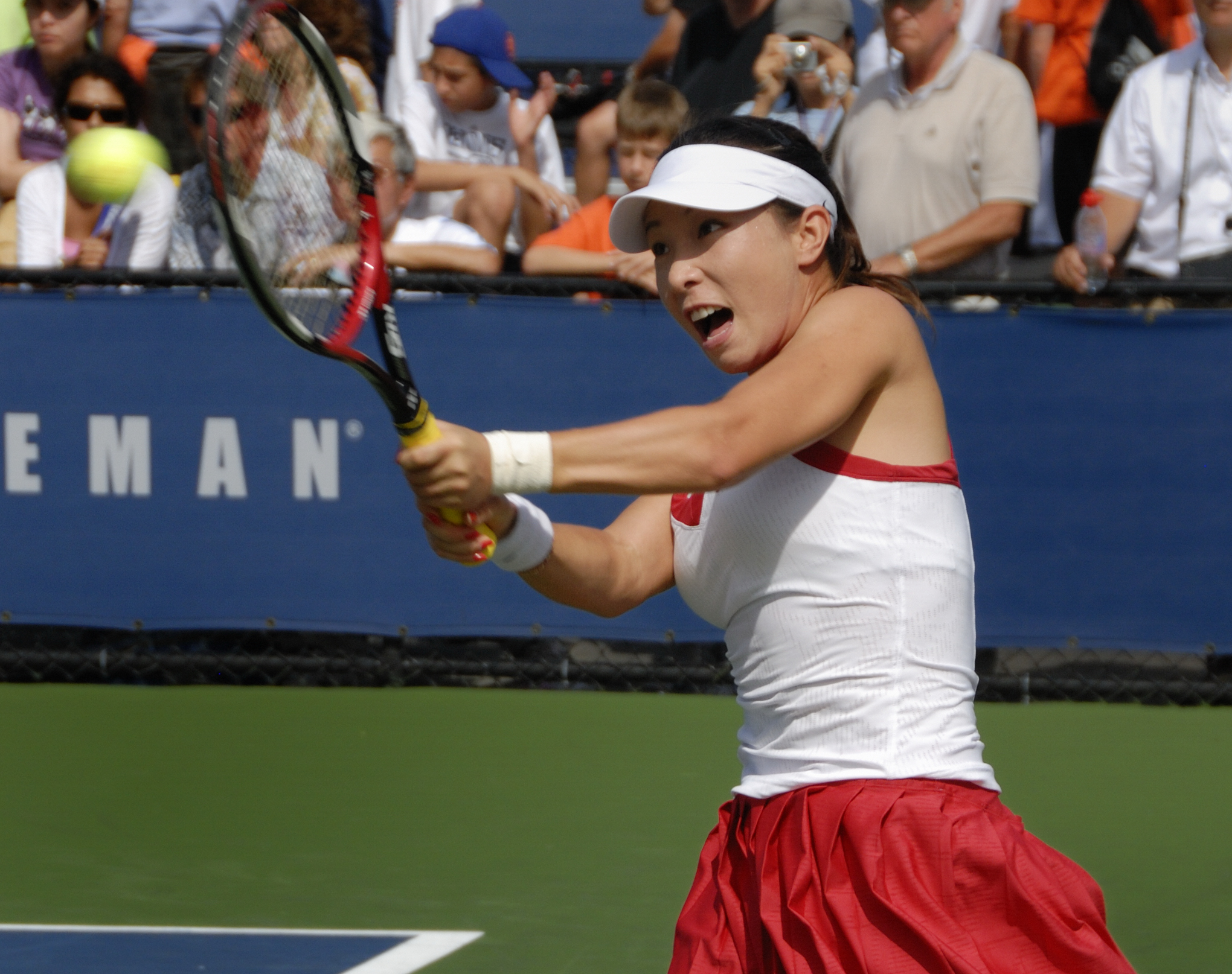 Zheng Jie at 2008 US Open